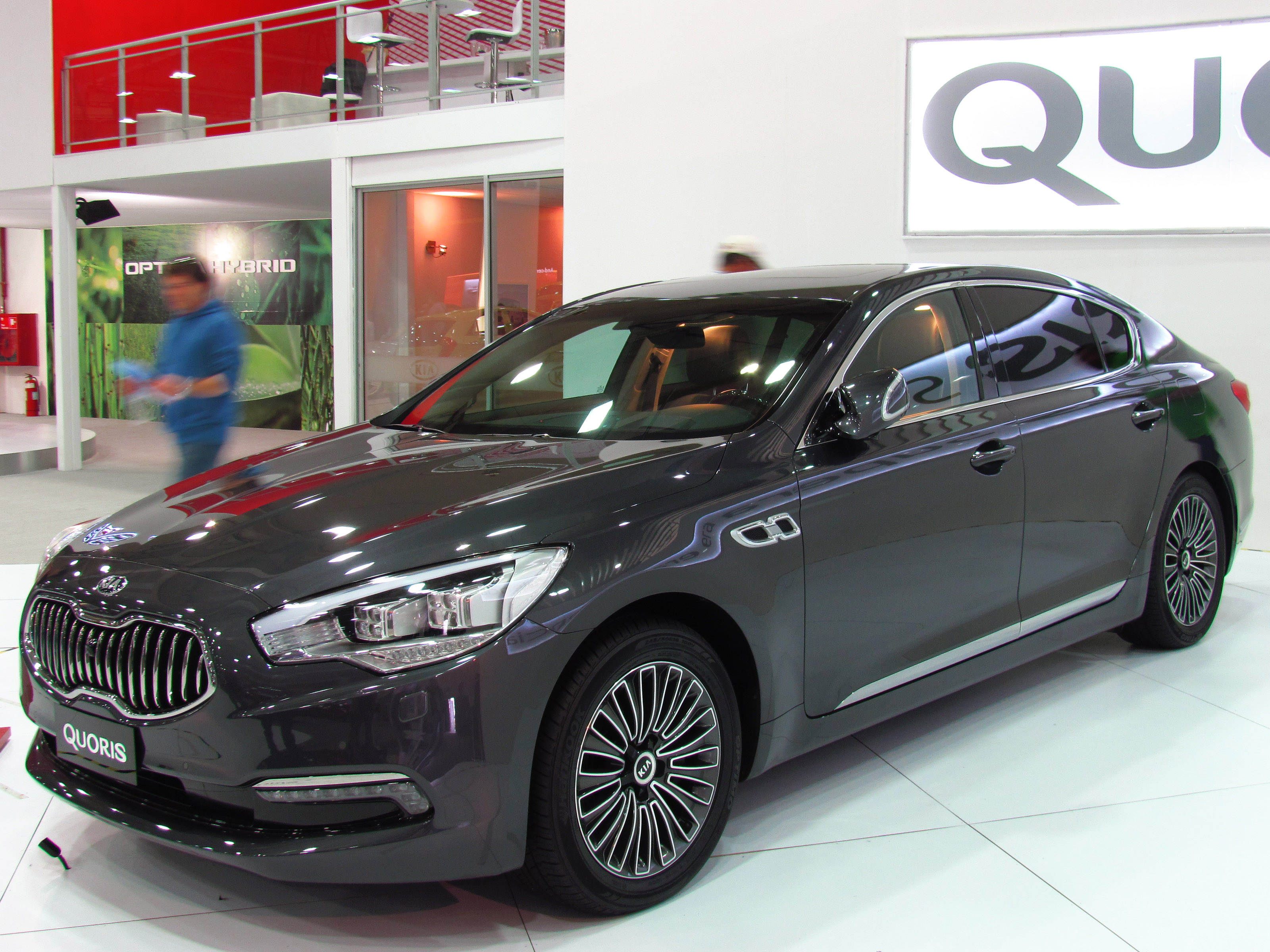 Kia Quoris 3.8 SX 2013